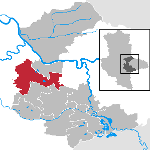 Osternienburger Land in Sachsen-Anhalt - Landkreis Anhalt-Bitterfeld